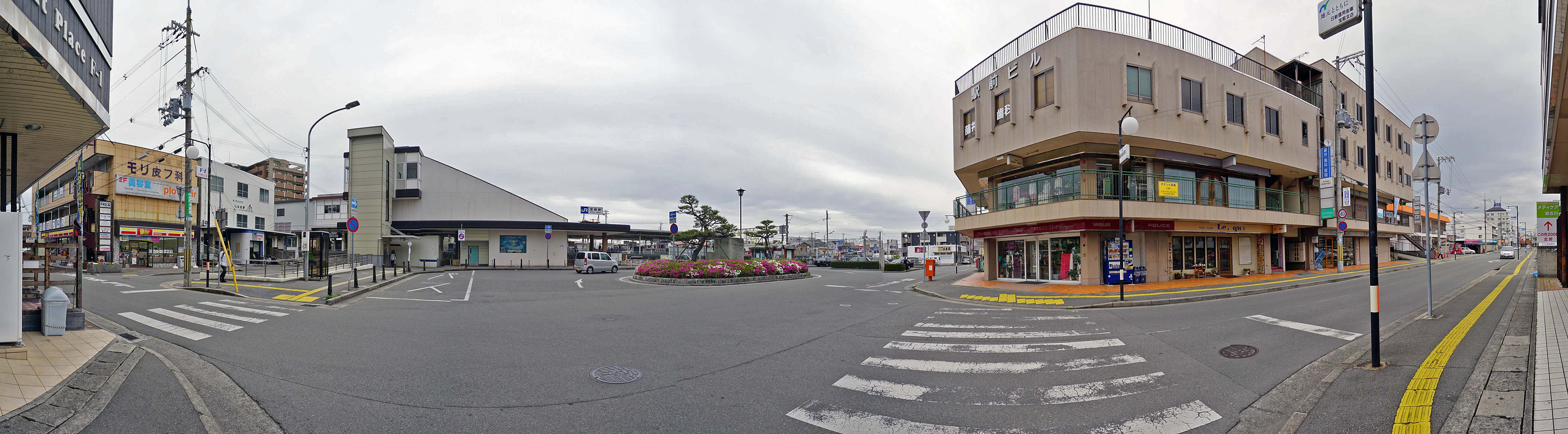 JR Hoden sta. , JR 宝殿駅